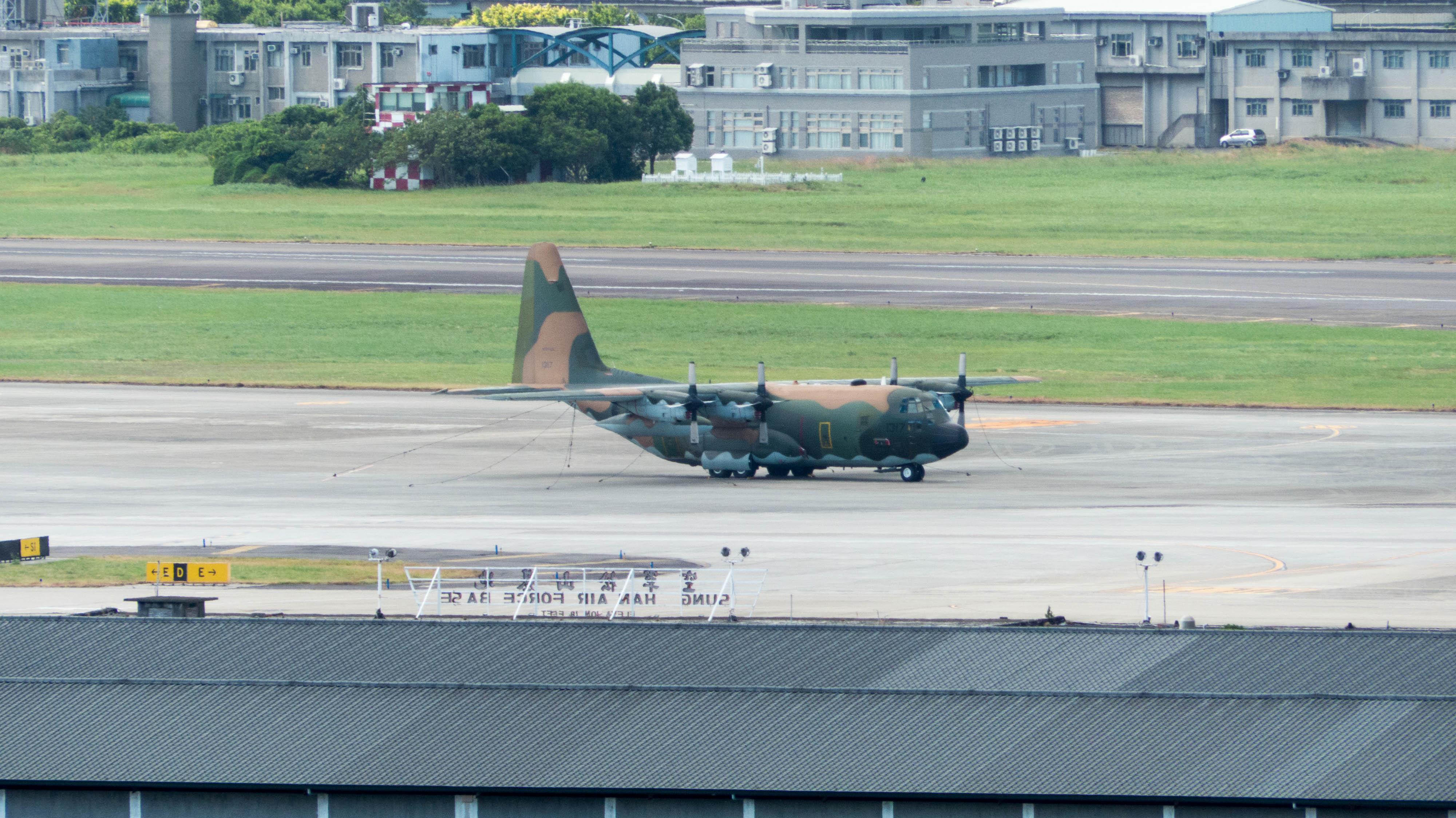 空軍松山基地停機坪的C-130H 1317運輸機，時值鳳凰颱風來襲前夕，機身各處以鋼索固定，以防強風。